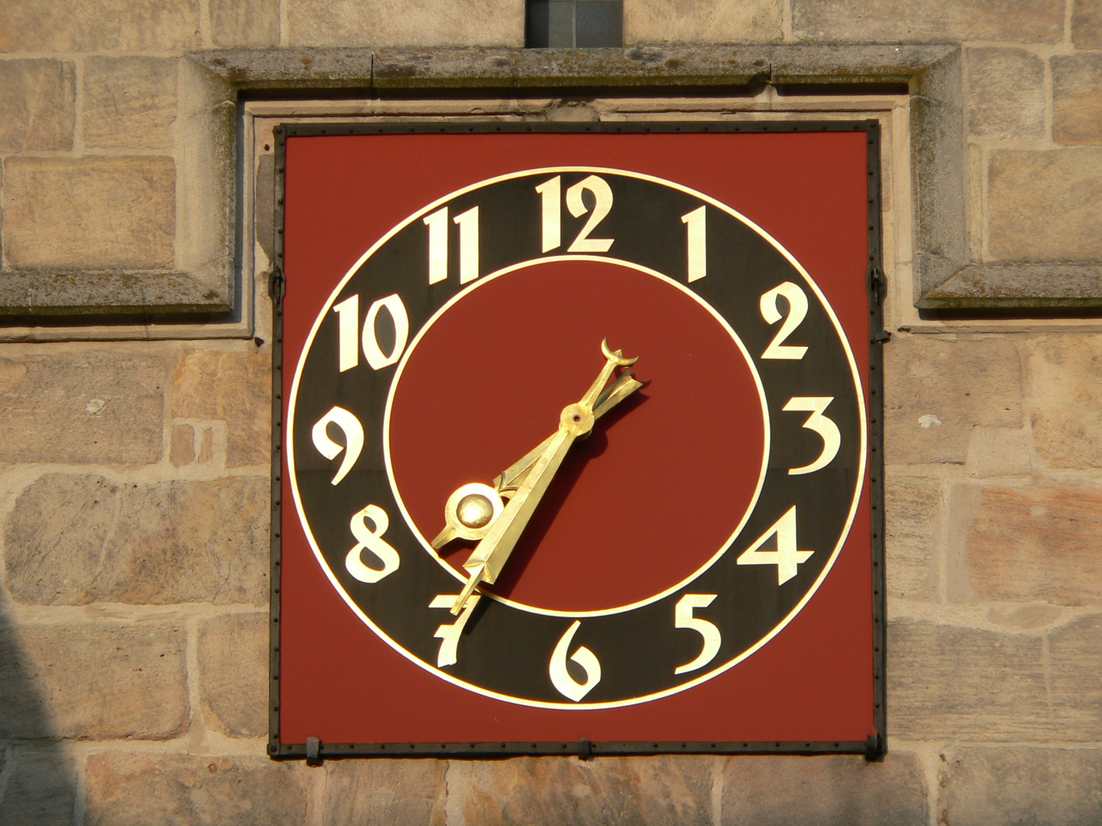 Boeblingen, Germany, Stadtkirche